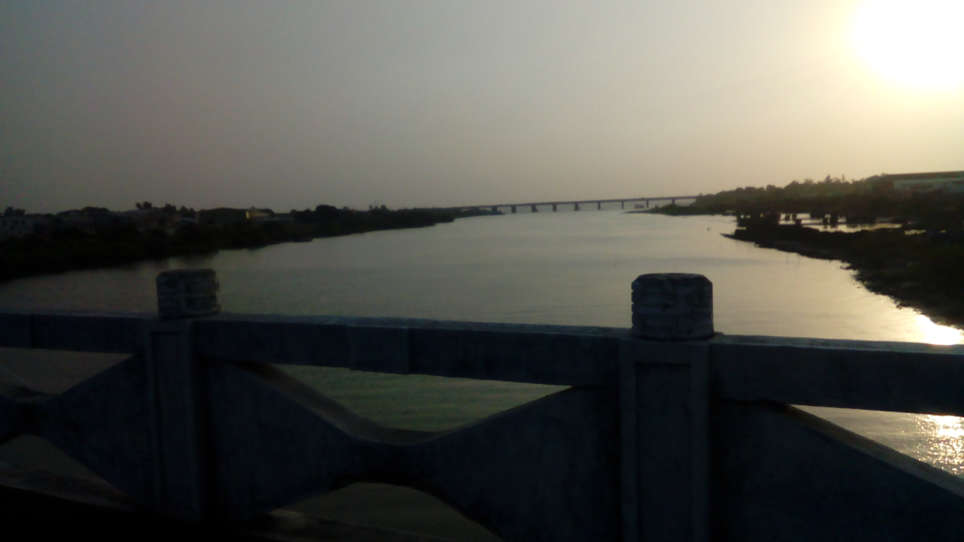 遠處橋樑為台17線二仁溪橋